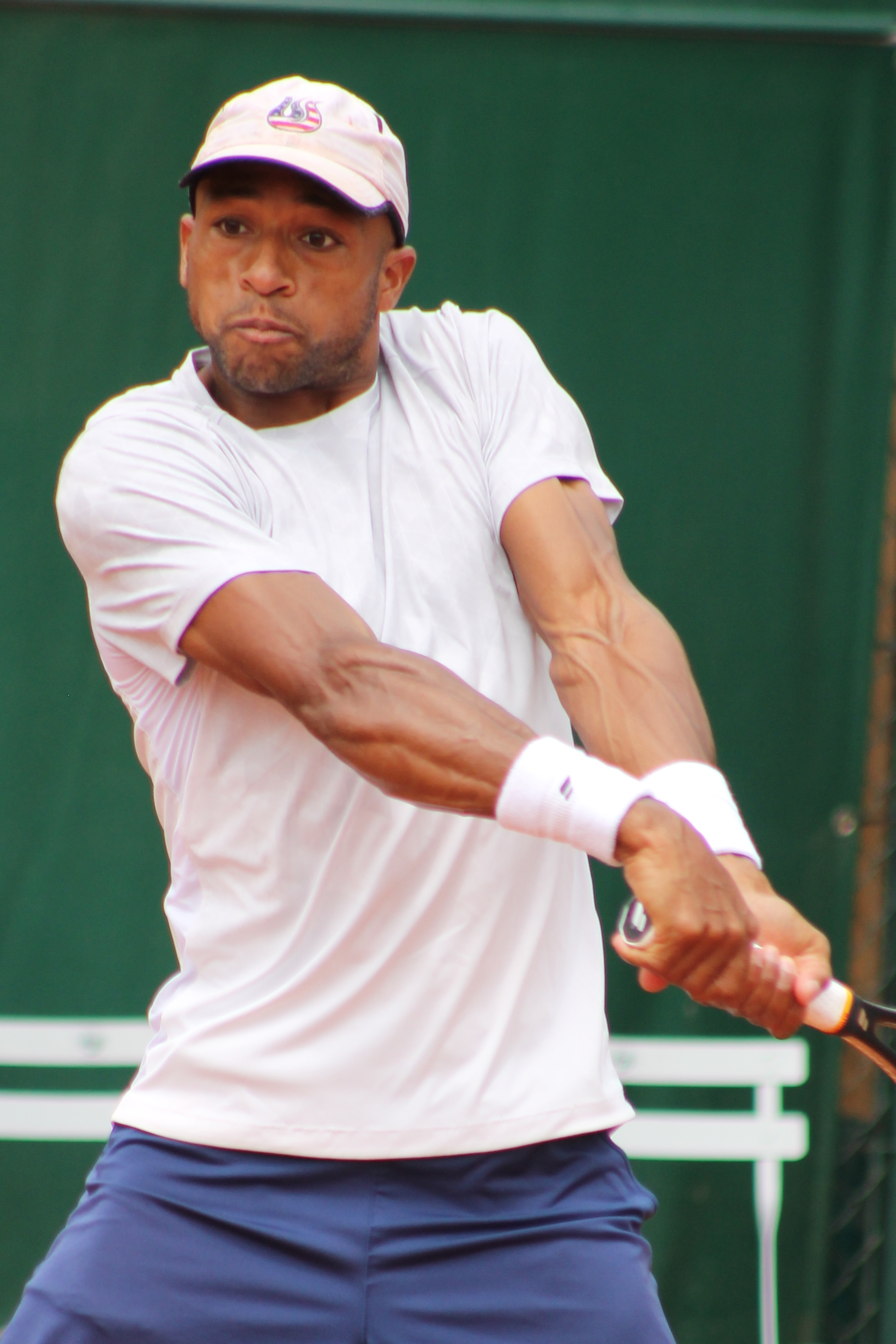 Monroe RG15 (9)